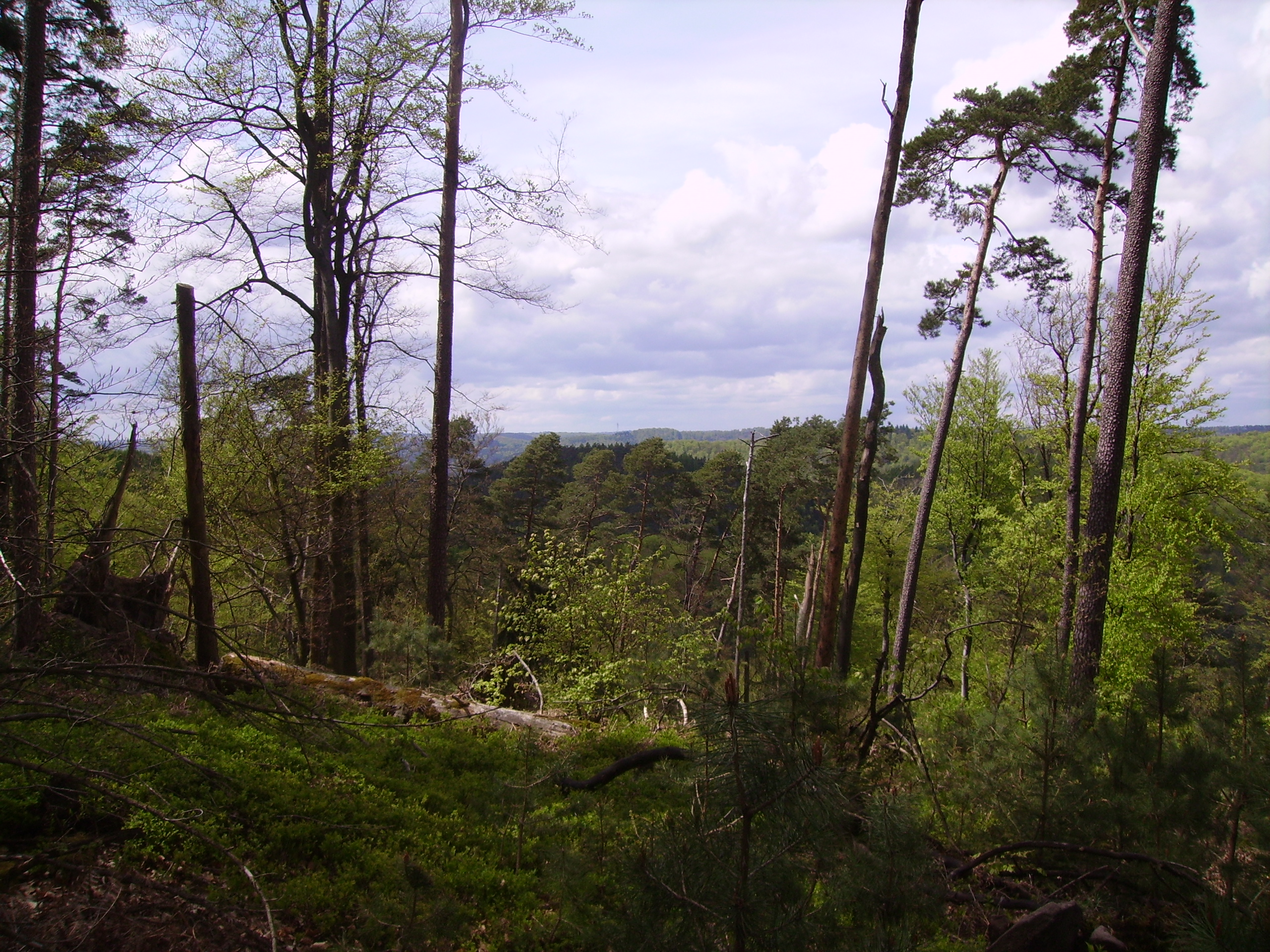 Photo prise dans la forêt d'Offwiler qui donne une vue sur Goetzenbruck